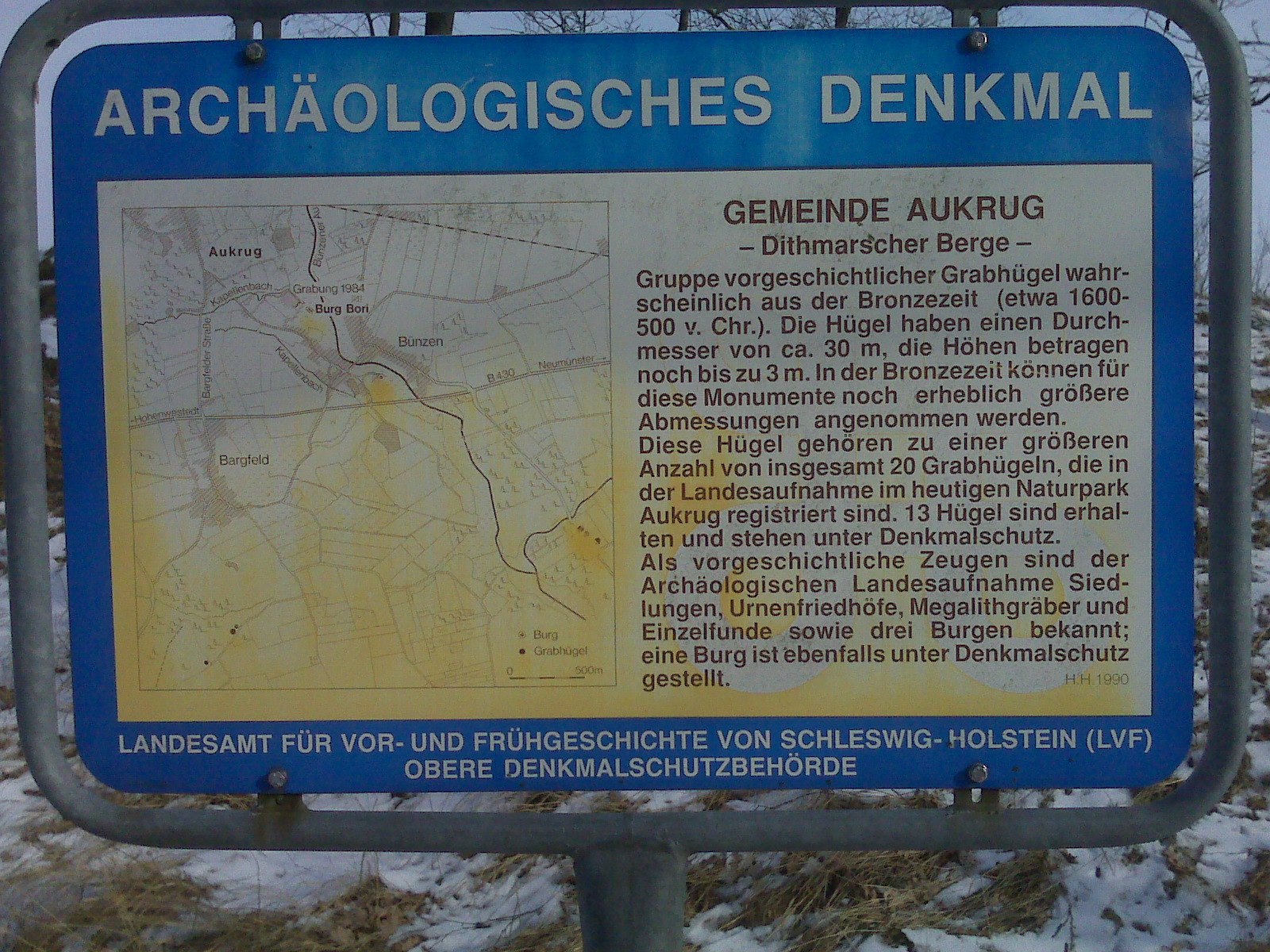 Informationstafel des Archäologischen Landesamtes an den Dithmarscher Bergen in Aukrug